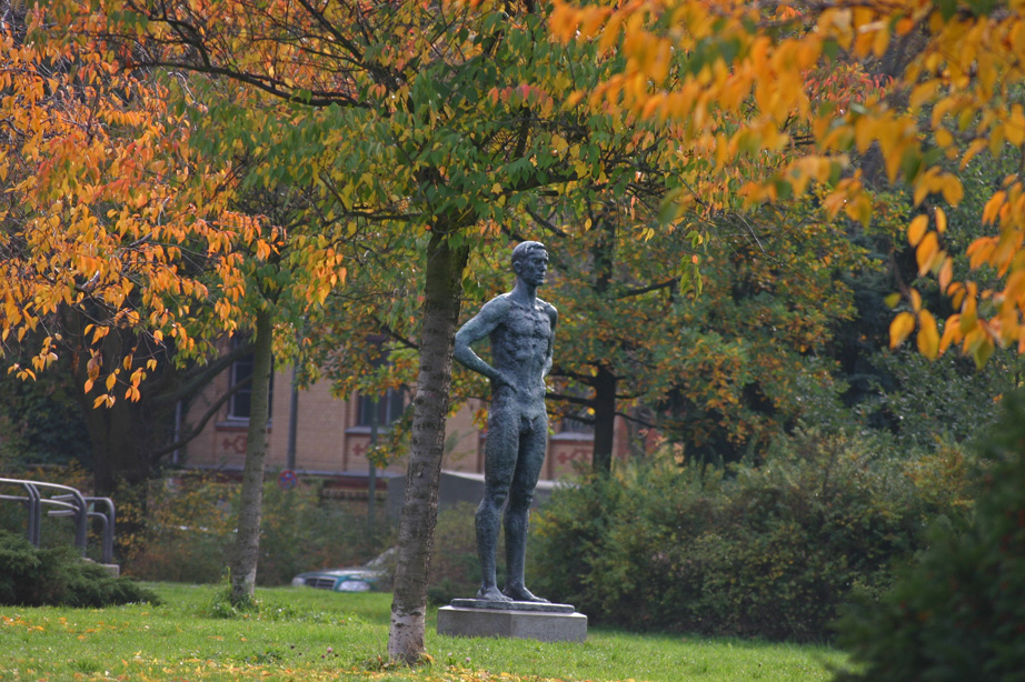 Bronzeskulptur "Sportler" von Margret Middell (1965) in Berlin-Prenzlauer Berg/Berlin/Germany. Standort: seit 1996 im Berliner Ernst-Thälmann-Park, vor dem Zeiss-Großplanetarium